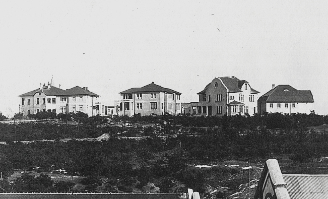 青岛美国长老会住宅群